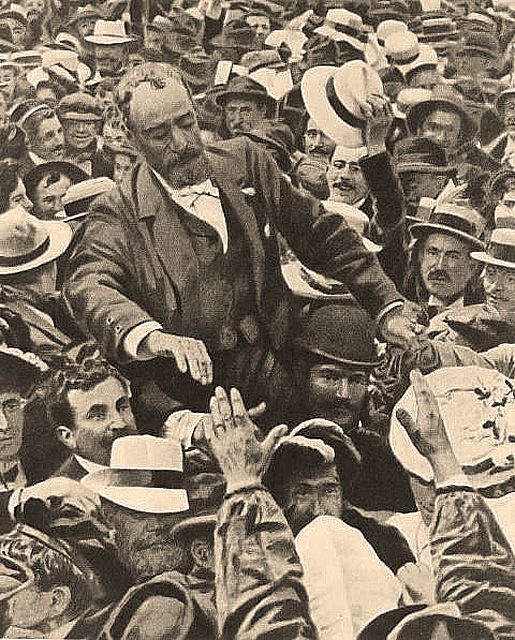 Marcelin Albert porté en triomphe à Montpelier le 9 jin 1907